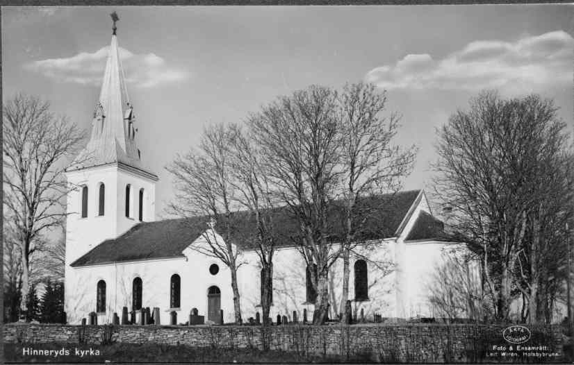 Kyrkan mot söder. Kategori: (01) ExteriörerKyrkan mot söder.